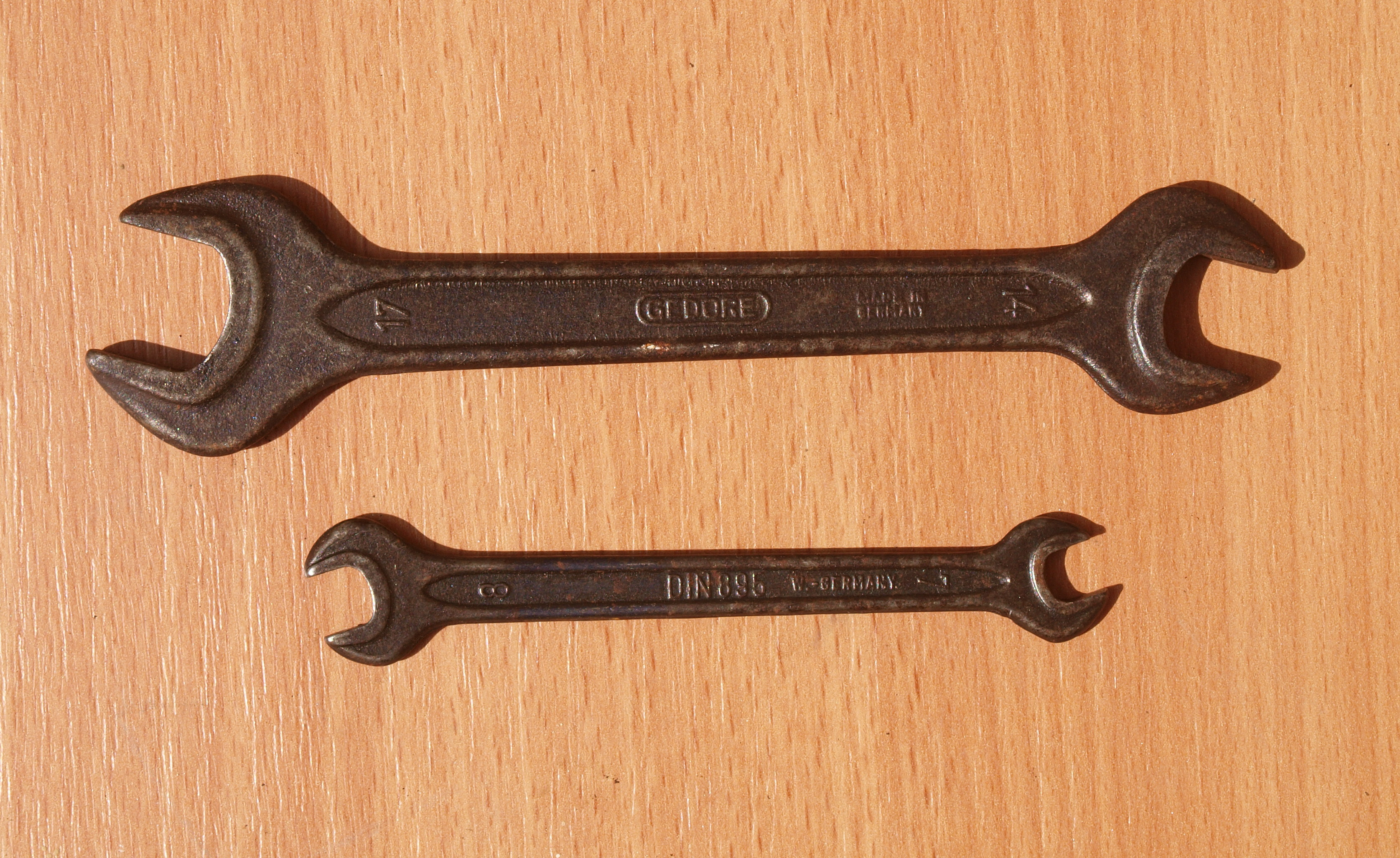 Clé de mécanicien